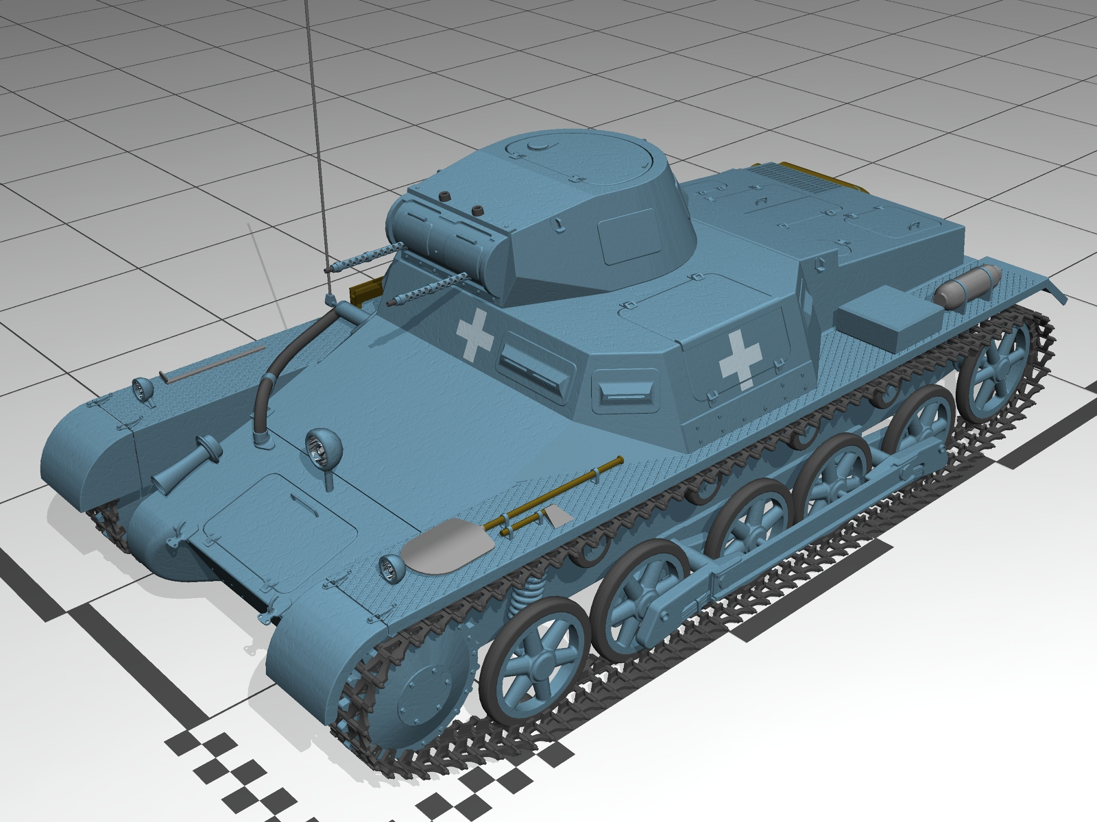 PanzerKampfwagen I B (3D model, isometric view)